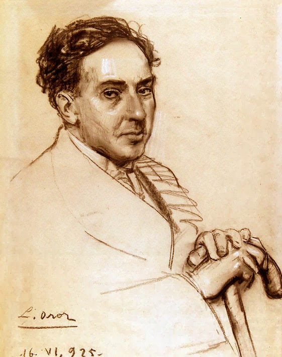 Retrato de Antonio Machado (1875 - 1939), sanguina de Leandro Oroz Lacalle (1883 - 1933). Fondos de la Fundación Ortega y Gasset.